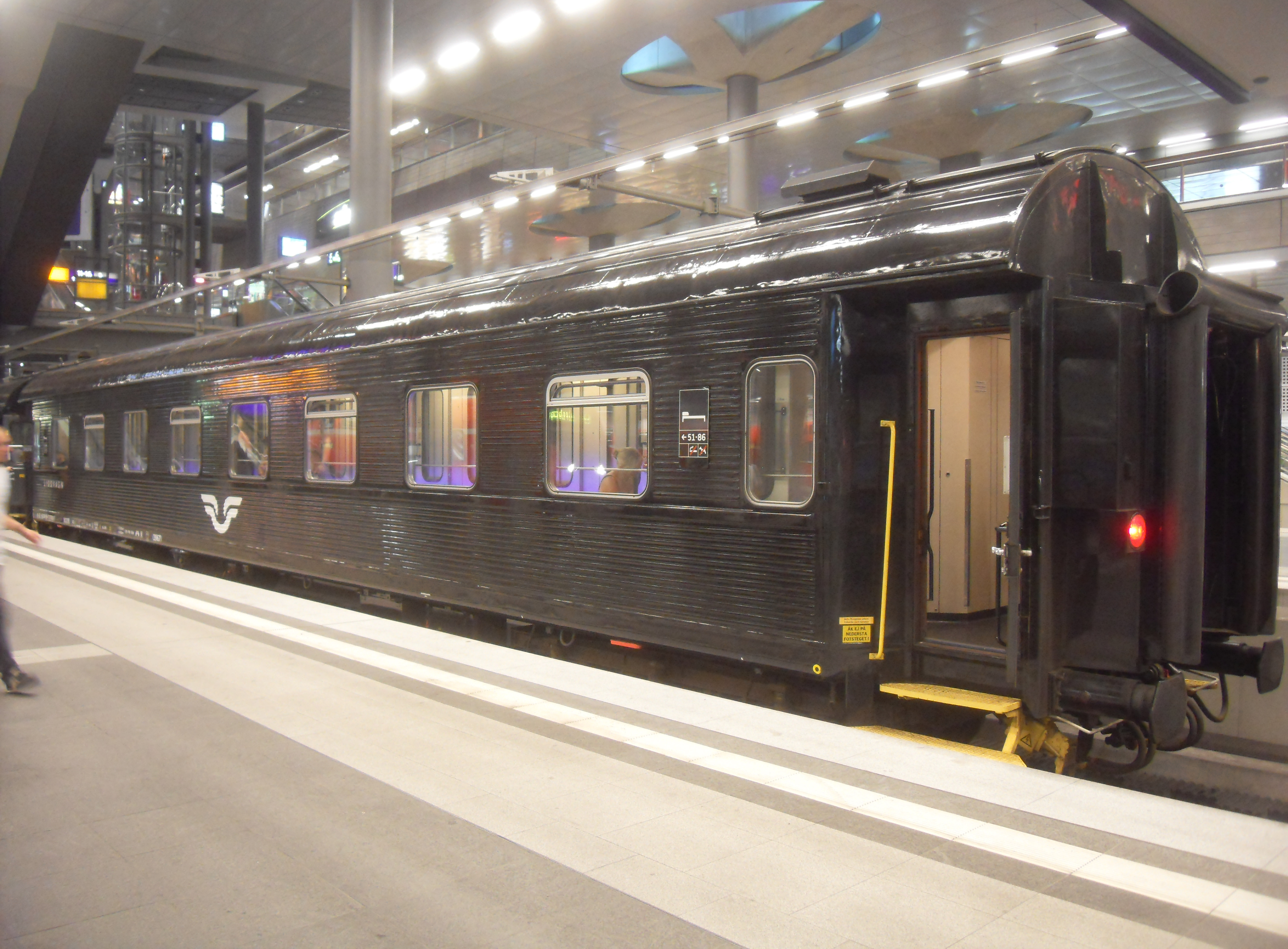 EuroNight-Wagen der SJ AB im Berliner Hauptbahnhof auf dem Weg nach Malmö Central